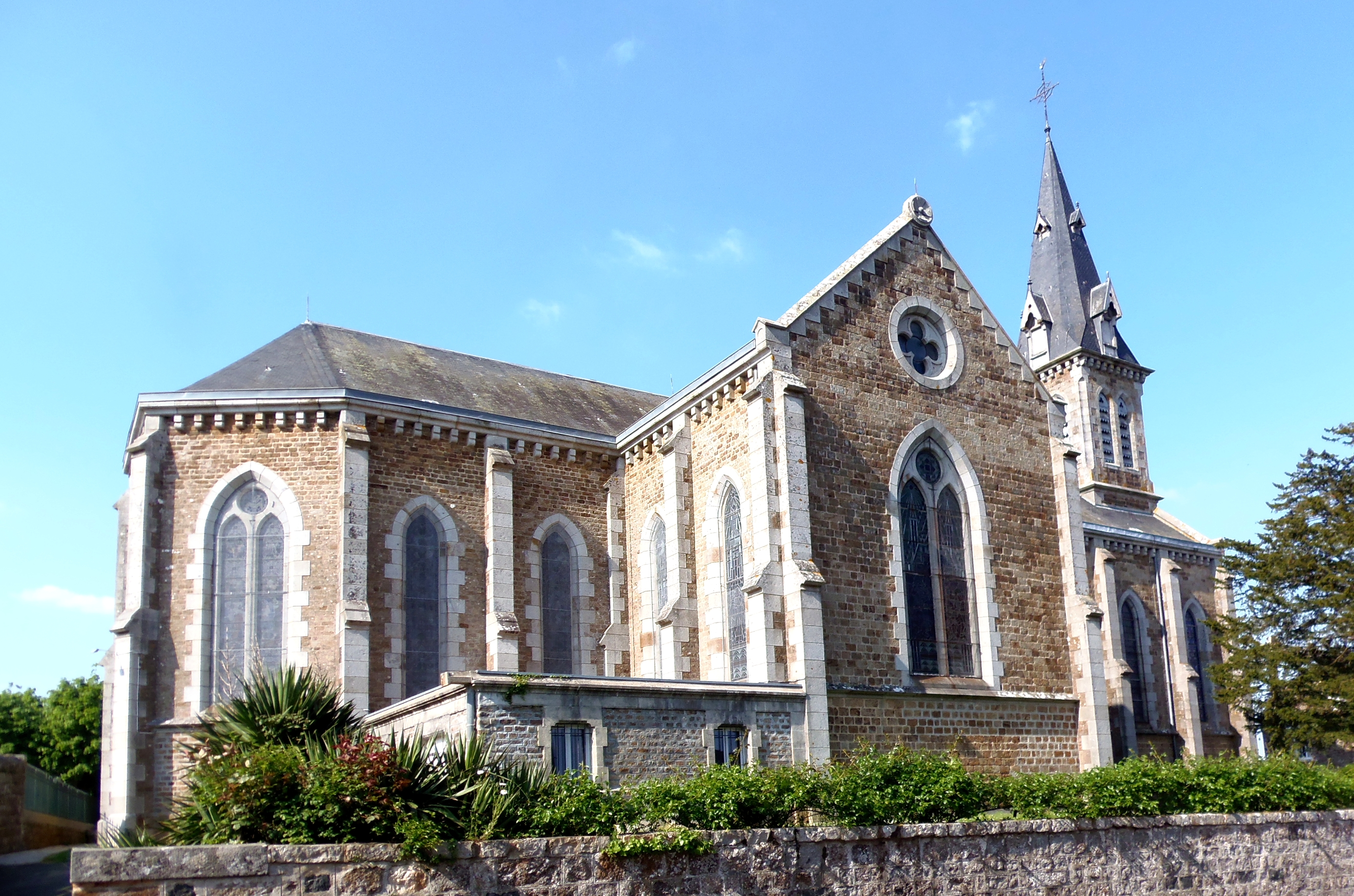 Saint-Mars-d'Égrenne (Normandie, France). L'église Saint-Médard.